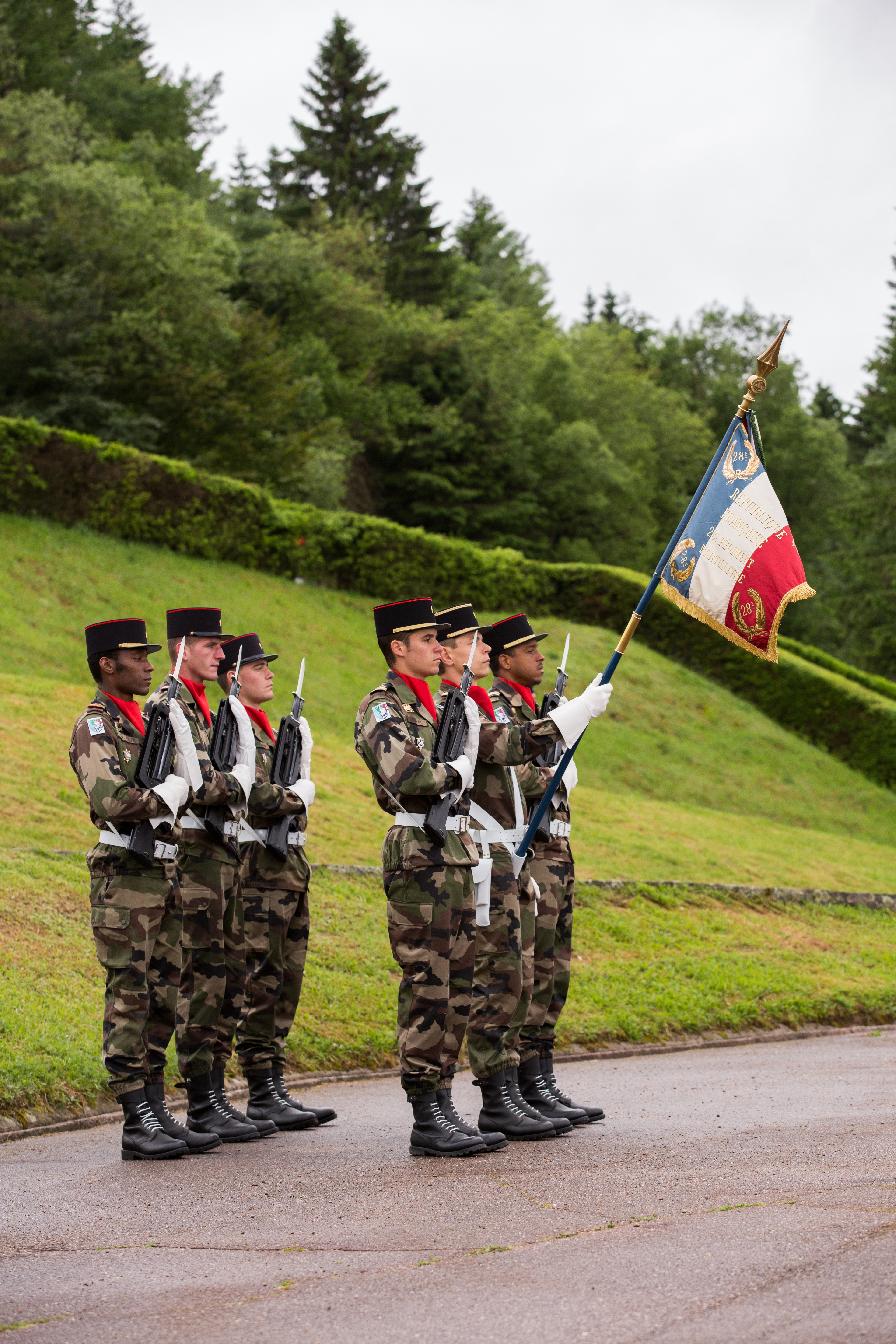 La garde d'honneur du 28e Groupe Géographique le 23 juin 2013 au camp de Natzweiler Struthof